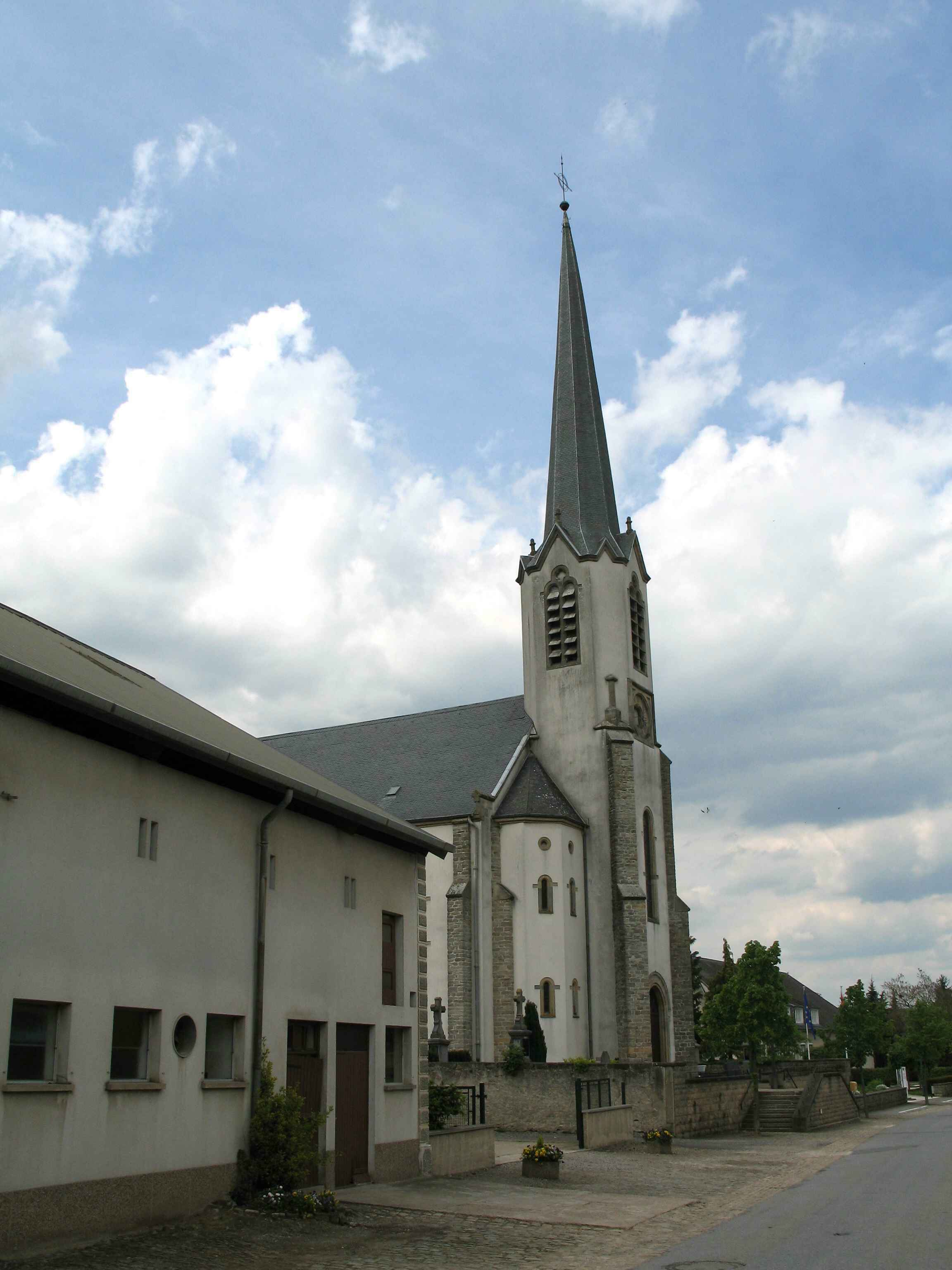 L'église de Nommern (Luxembourg)